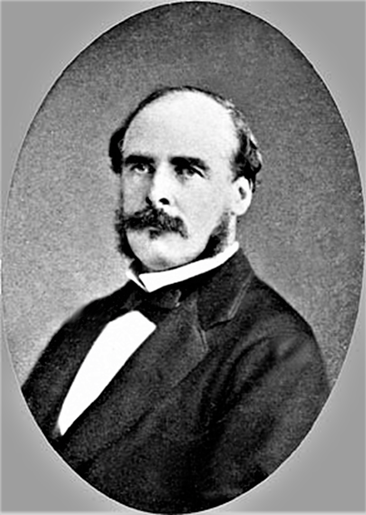 Jean-Louis-Émile Boudier (1828-1920), Aquarelist, Entomologe und Mykologe um 1880